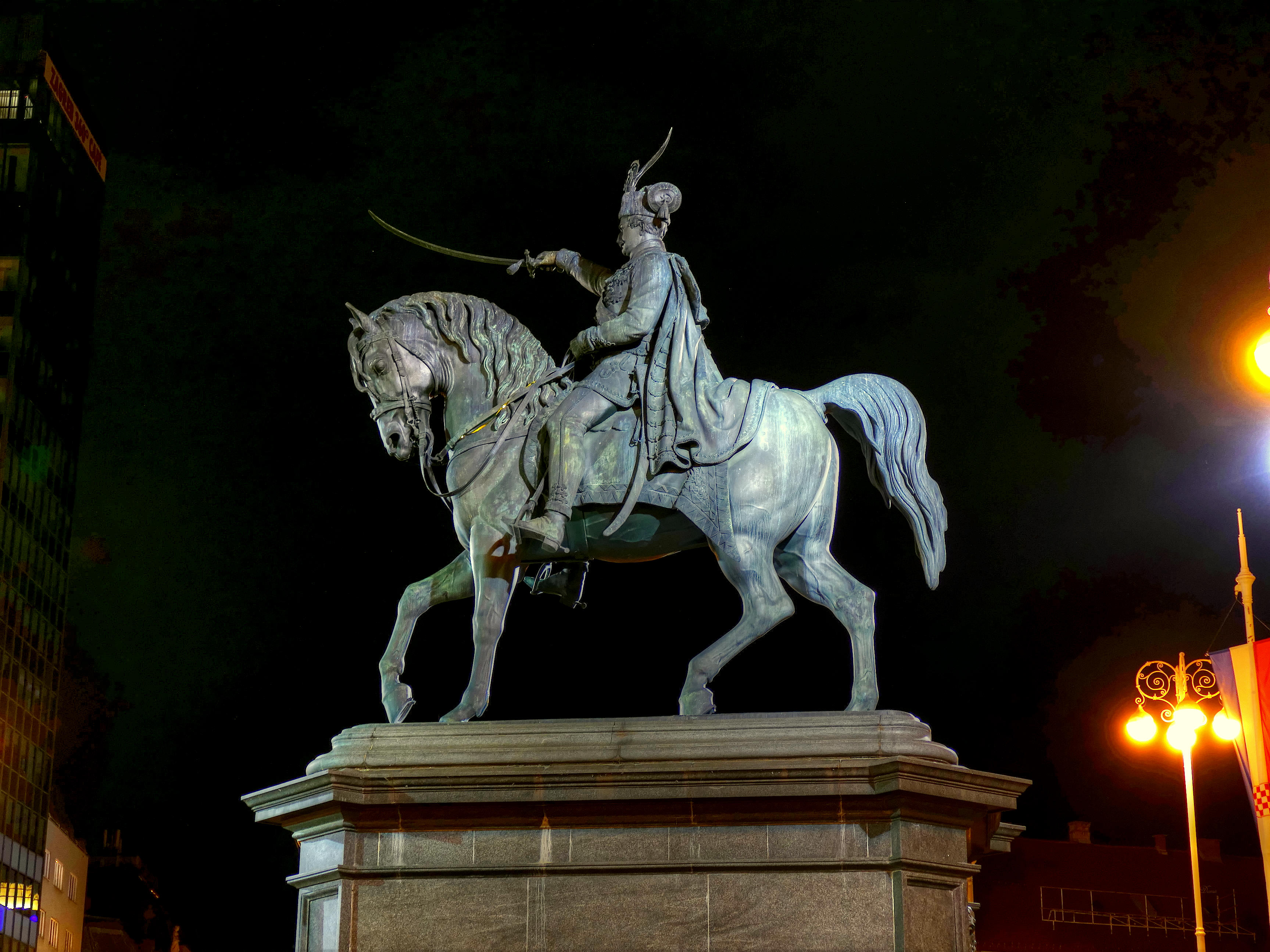 Beschreibung: Siehe Link 1+2+3